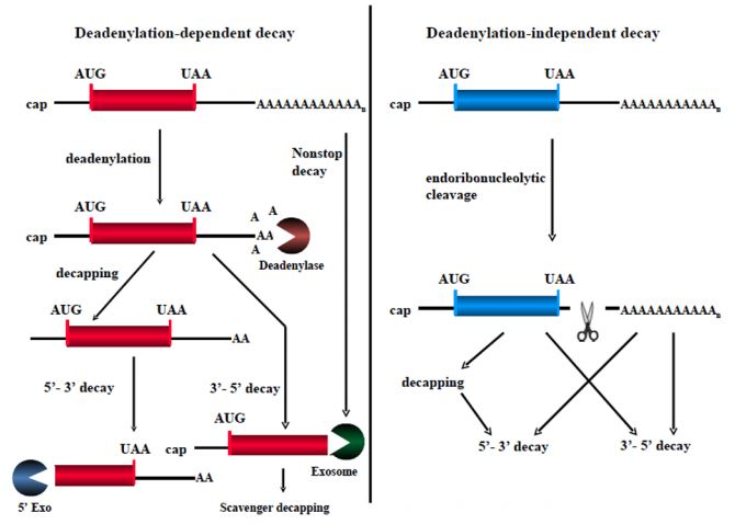 Vias de decaimiento del ARN mensajero en células de Mamíferos. Desadenilación dependiente y desadenilación independientes (es decir endonucleolpitica) se representan por dos vias distintas